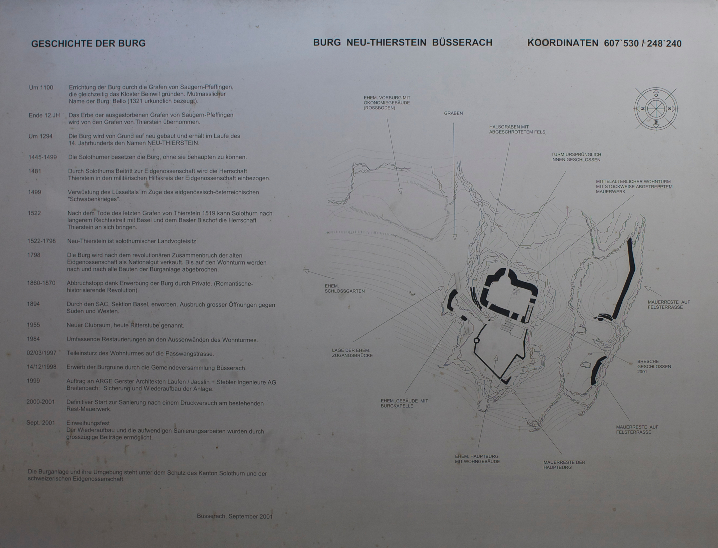 Informationstafel in der Burg Neu-Thierstein